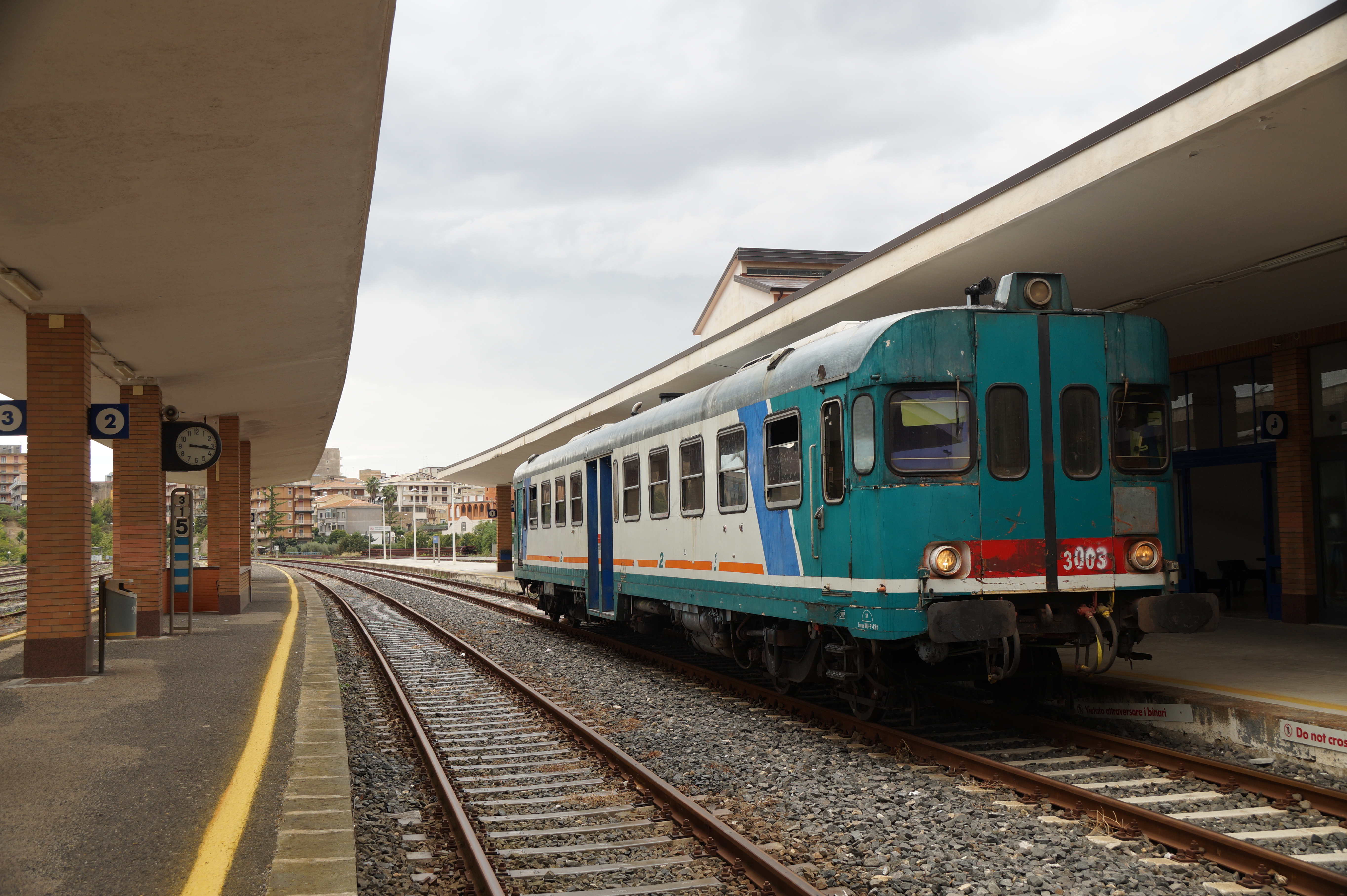 Dieseltriebzug der Baureihe ALn 668 im Bahnhof Caltagirone